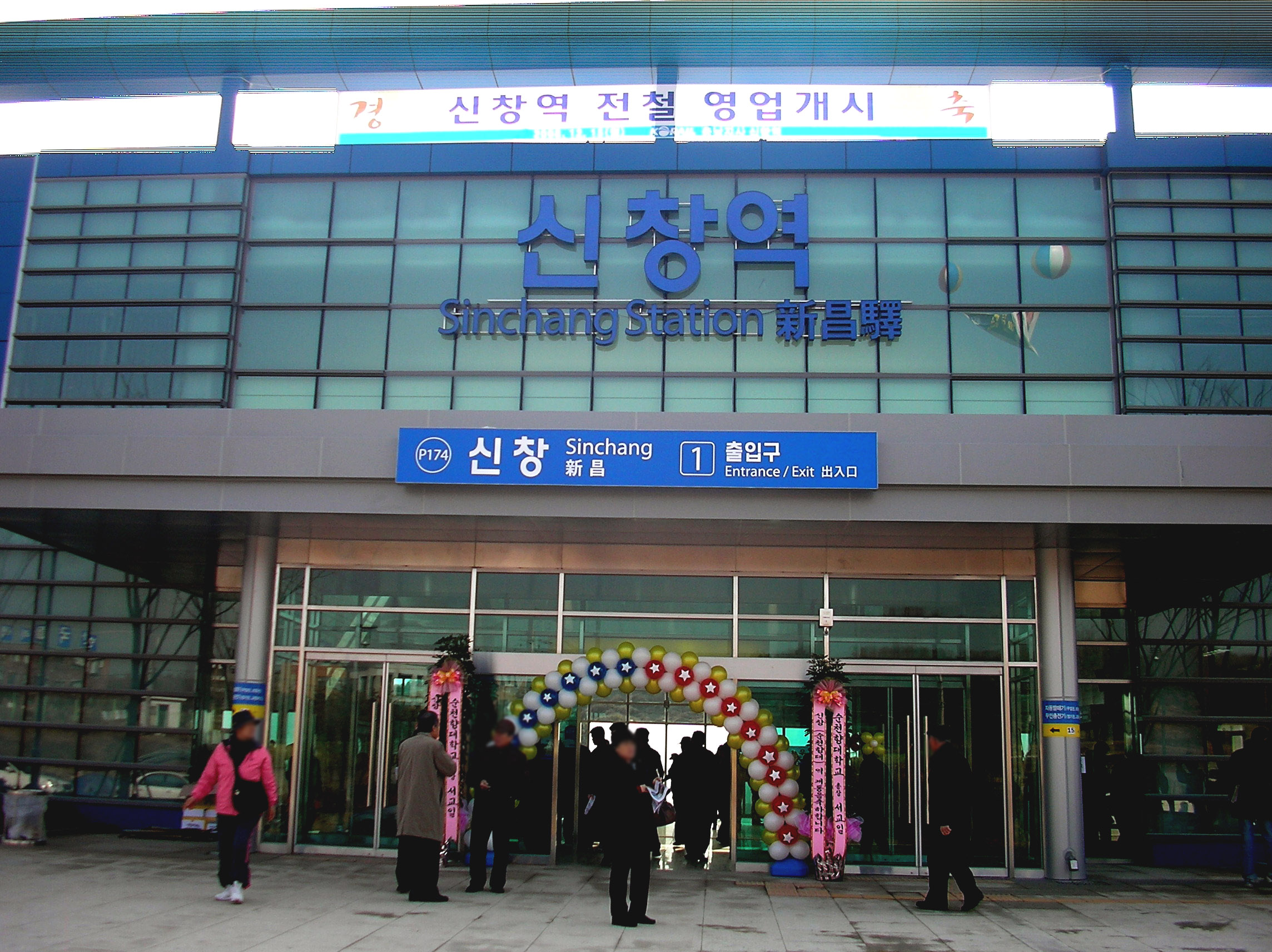 Sinchang Station (ko ja)